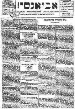 Главата на вестник "Аванти" (1912).